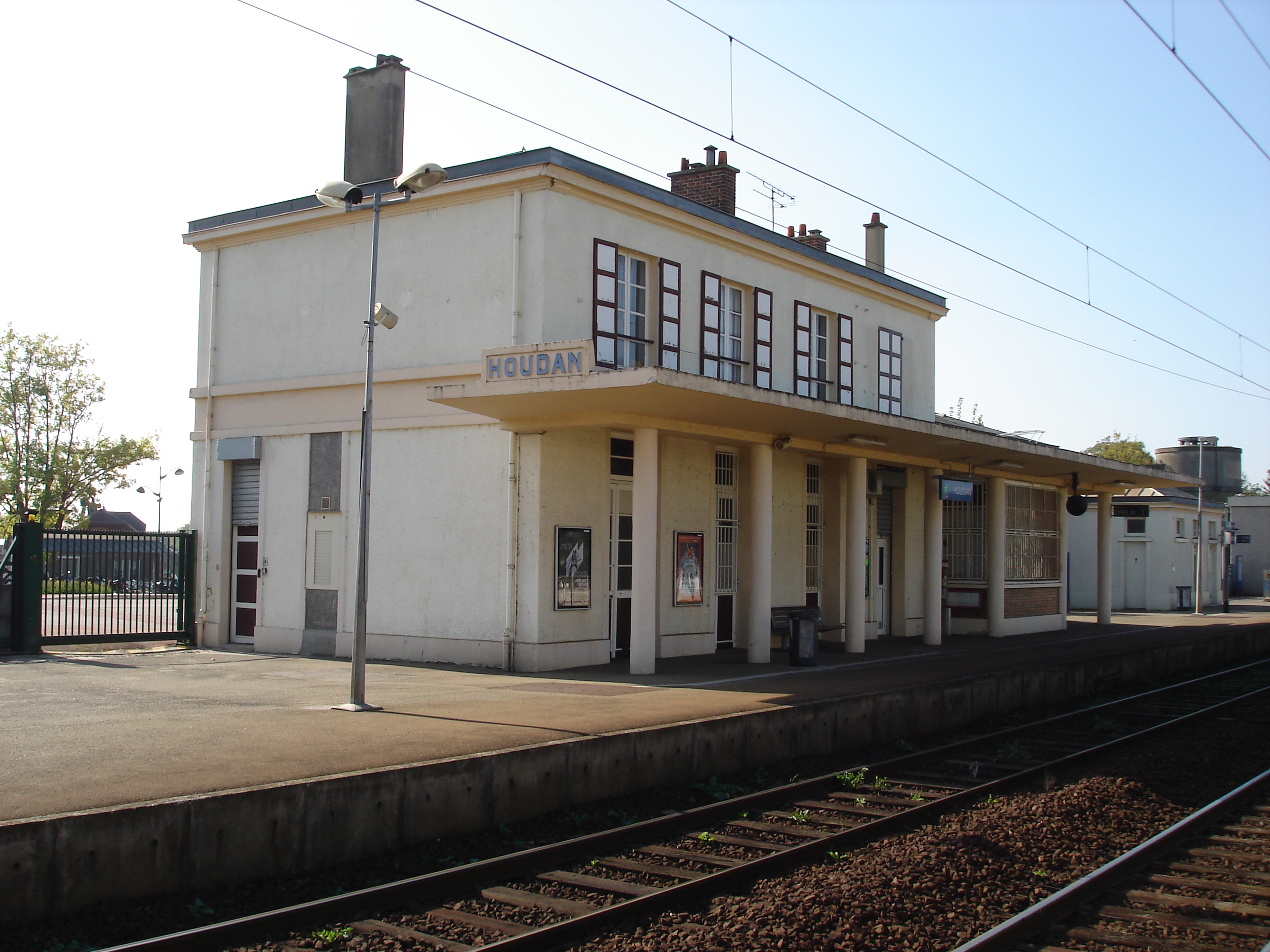 Gare de Houdan (78) : Le bâtiment voyageurs.